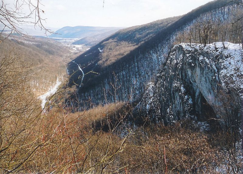 Krajinný priestor rieky Turňa od jej prameňa pod Zbojníckou skalou (na zábere vpravo spolu so Zbojníckou jaskyňou) na Silickej planine, pozdĺž Sokolej doliny (uprostred medzi Silickou planinou a Silickým úbočím) až po západnú časť Turnianskej kotliny (v pozadí spolu s planinami Dolný vrch /vpravo/ a Horný vrch /vľavo/). Pohľad od Komínovej jaskyne.